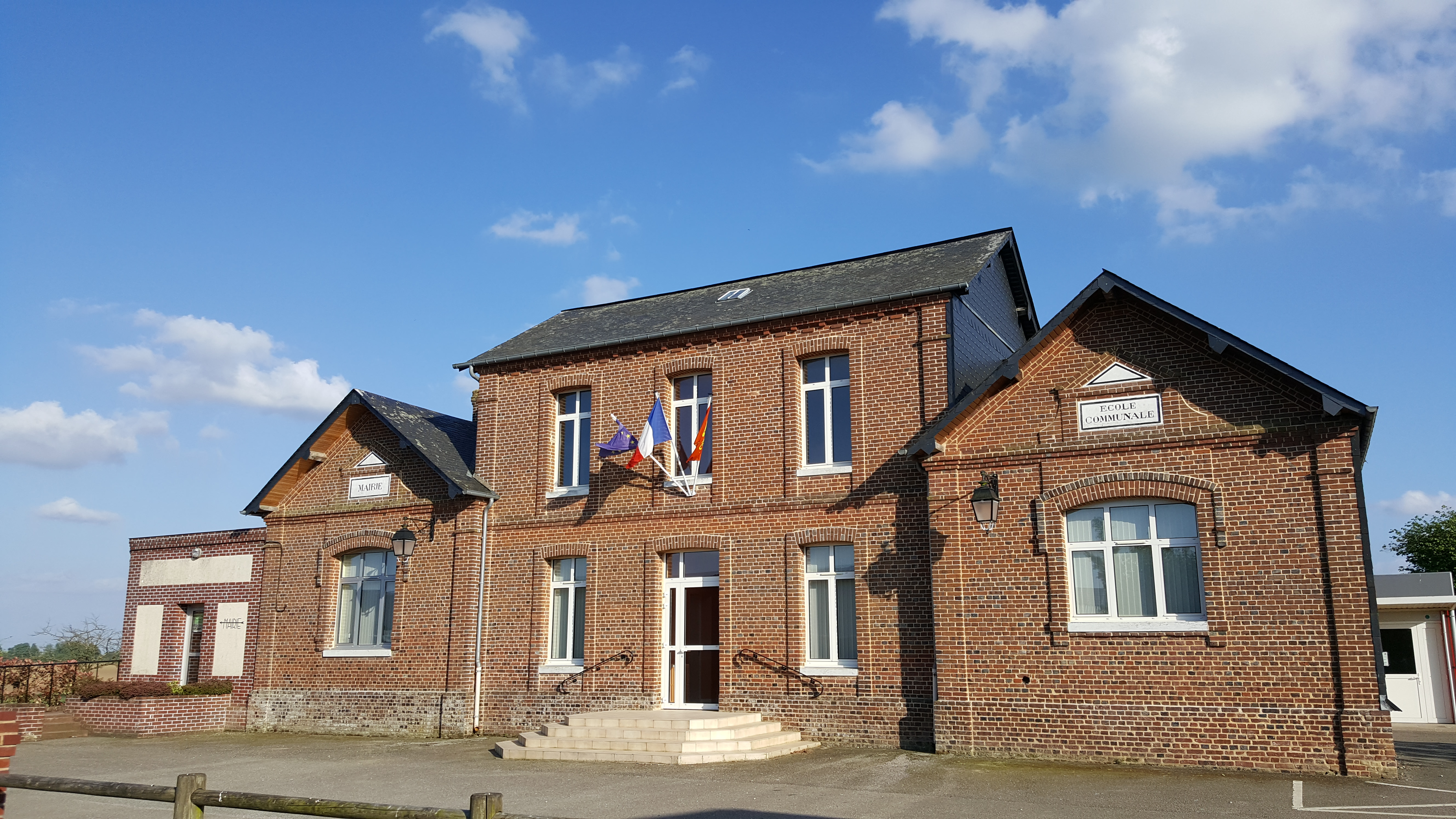 Mairie Ecole Lindebeuf